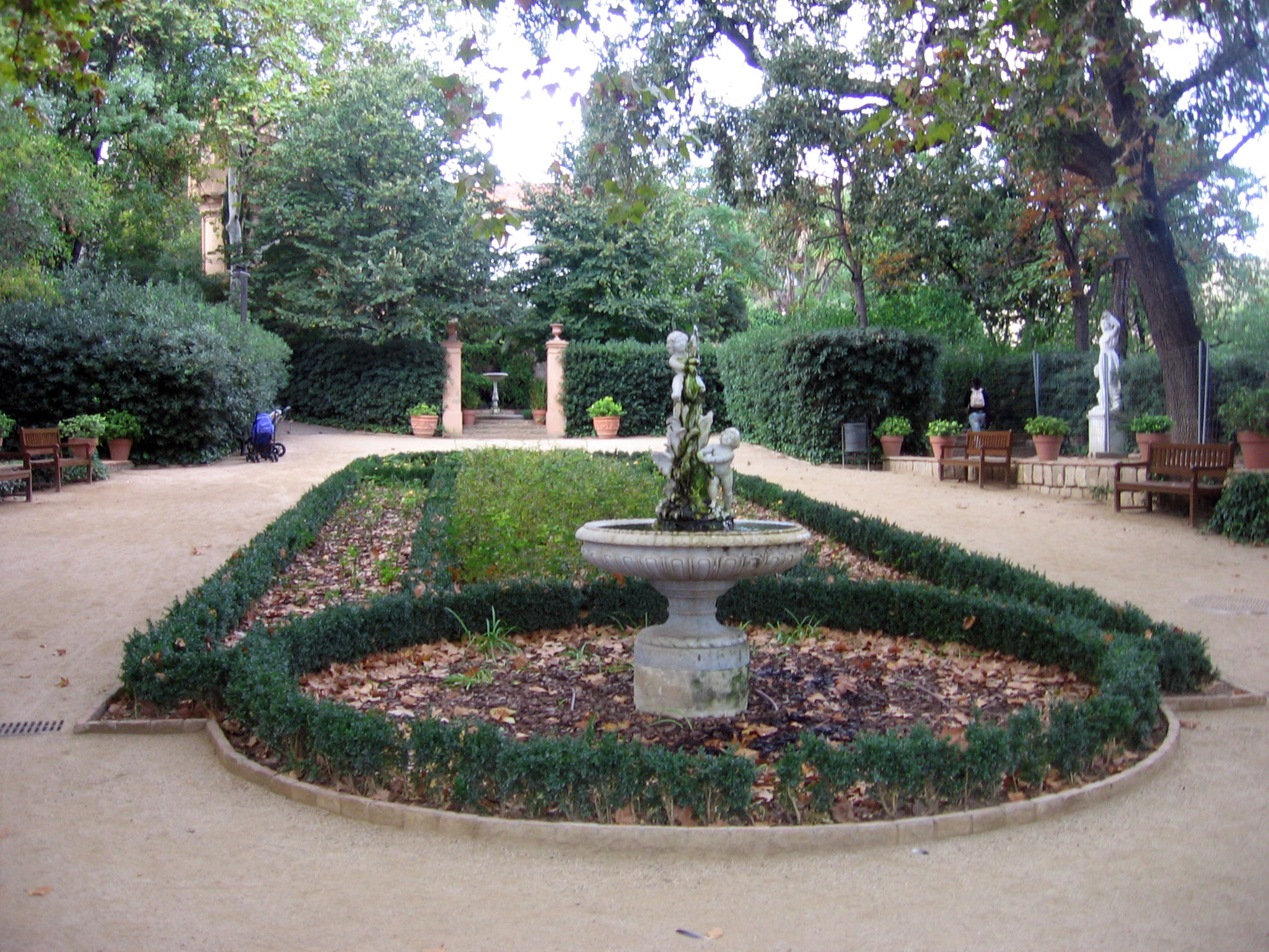 Jardines de la Tamarita.